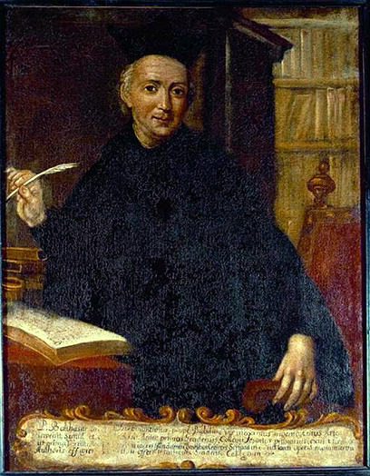 Retrato de Baltasar Gracián que se conserva en Graus, restaurado. El escritor fue destinado al colegio jesuita de Graus a comienzos de 1658 como represalia por la publicación de las tres partes del Criticón (1651, 1653, 1657). El retrato estuvo en el colegio grausino de la Compañía de Jesús, anexo a la iglesia de los jesuitas, que fue desmantelado en los años 1960. Sin embargo el retrato había sido trasladado anteriormente a la iglesia parroquial de San Miguel de Graus.